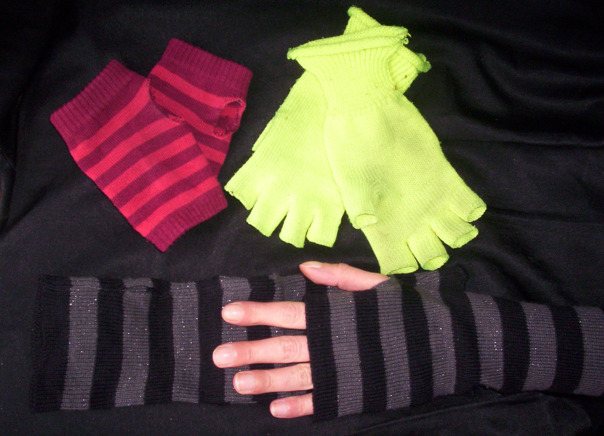 Mitaine01.jpg